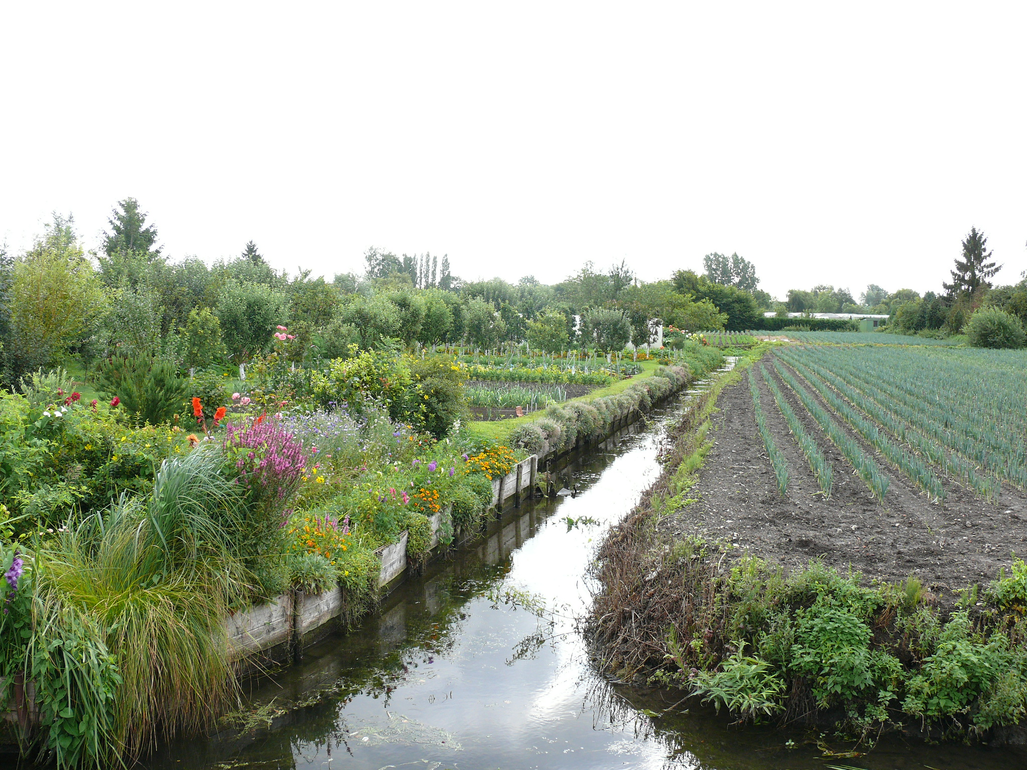 Les Hortillonnages d'Amiens (depuis la rue de l'Agrappin)